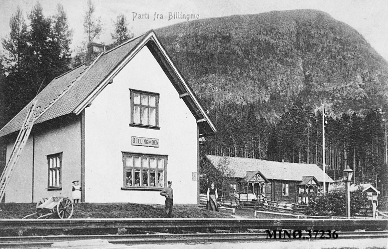 Bellingmo stoppested, 1912